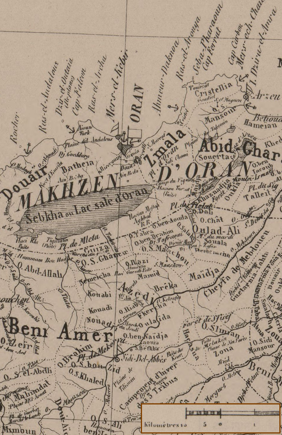 Algérie, vers 1845. Carte des tribus au sud de la ville d'Oran. Extrait de la carte de E. Carette et Auguste Warnier publiée par l'institut géographique national français en 1846.